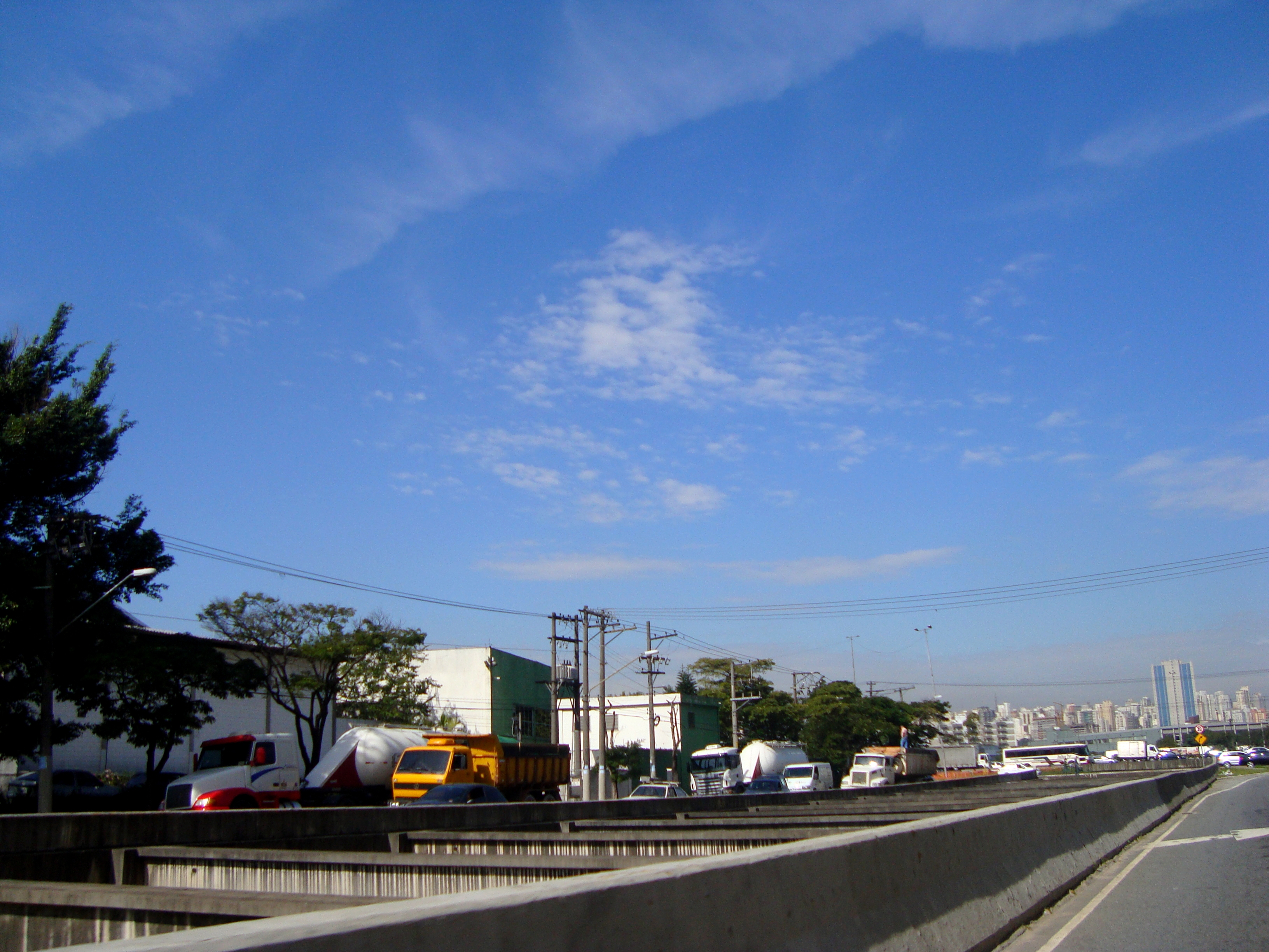 Foto da avenida engenheiro caetano álvares no limão são paulo